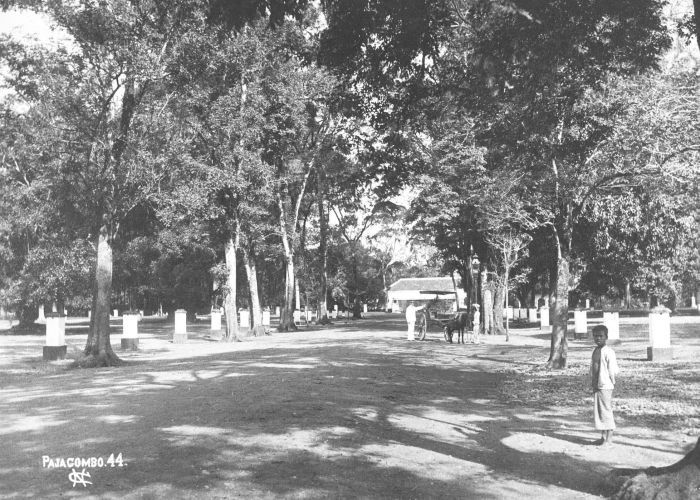 Foto. Huis van de assistent resident te Pajakoemboeh